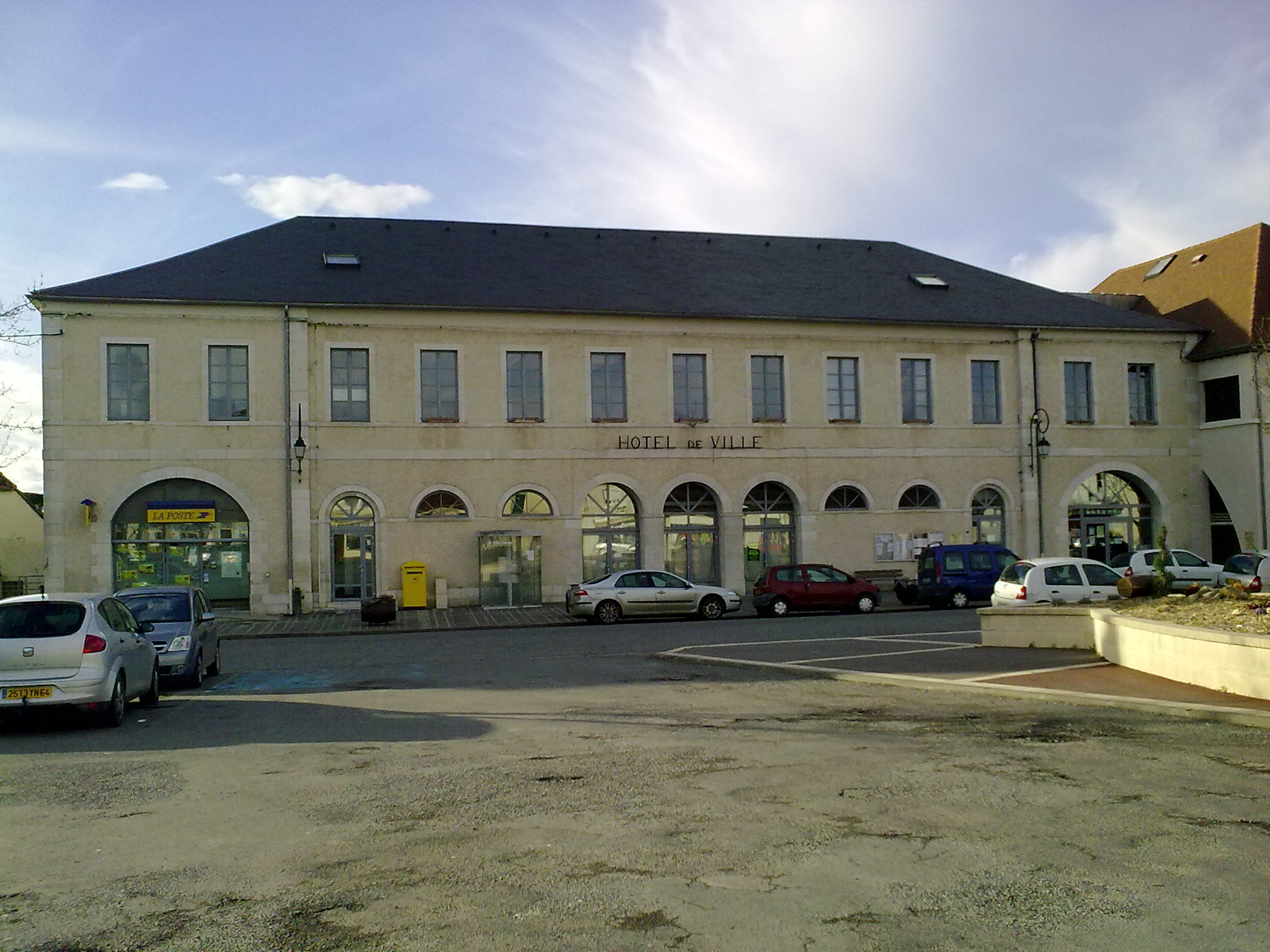 Mairie de Lembeye